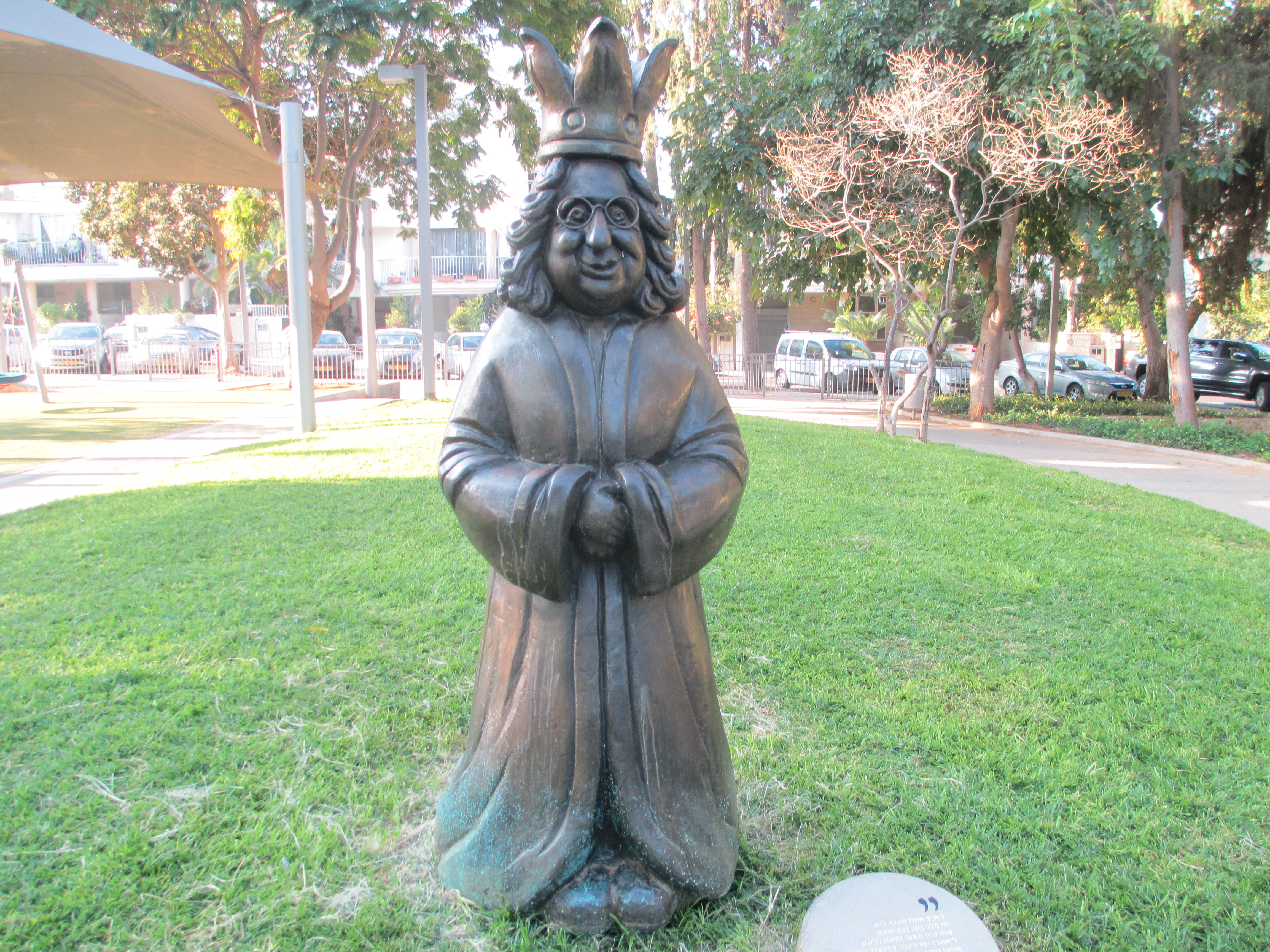 גן סיפור העלילות פרדיננד פדהצור בקיצור בחולון